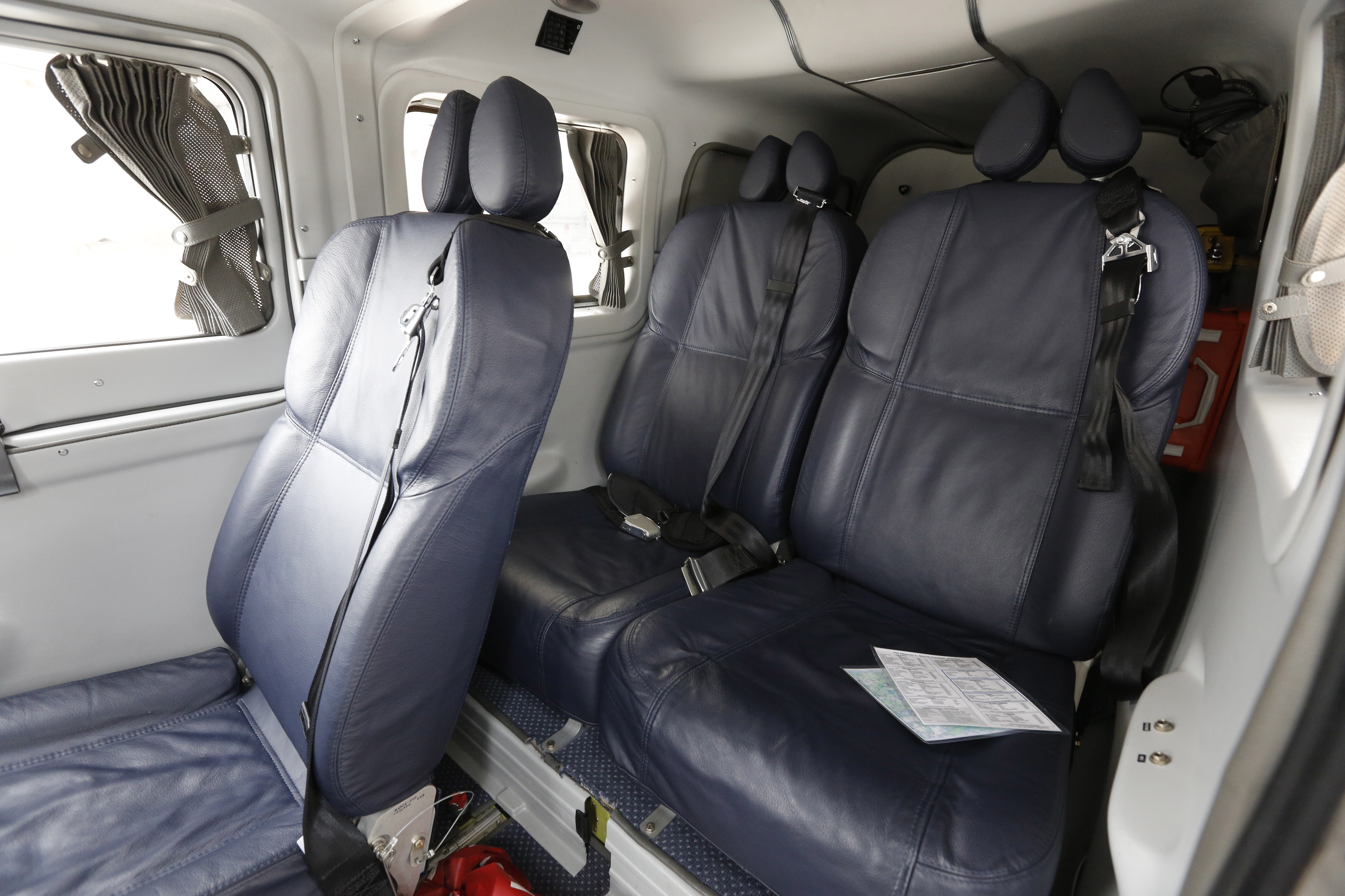 Vulcanair P68 Observer 2 als Polizeiflugzeug "Ibis 7" (D-GHEA) der hessischen Polizeifliegerstaffel am Flugplatz Egelsbach.